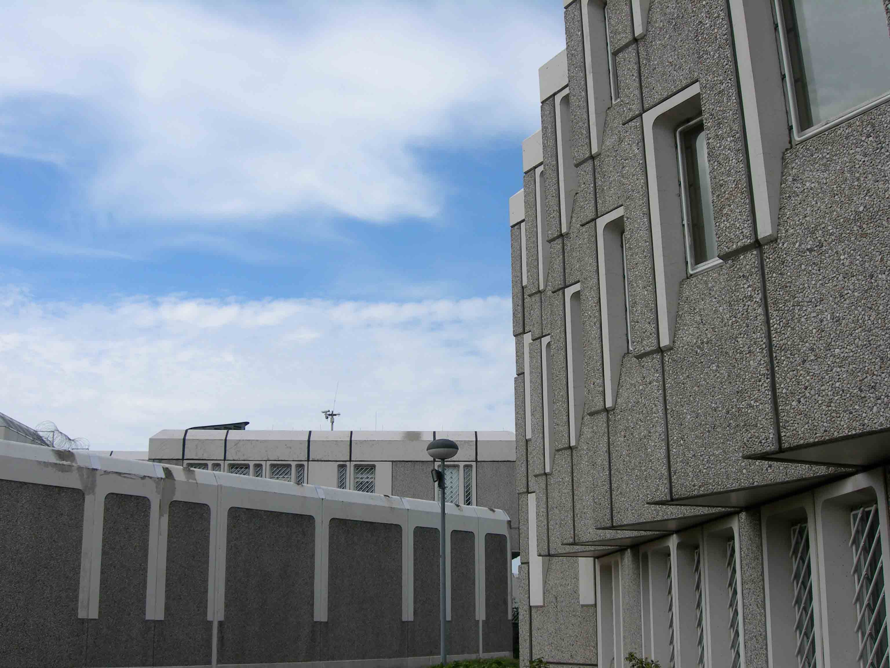 Ploetzensee prison, 1982 extension